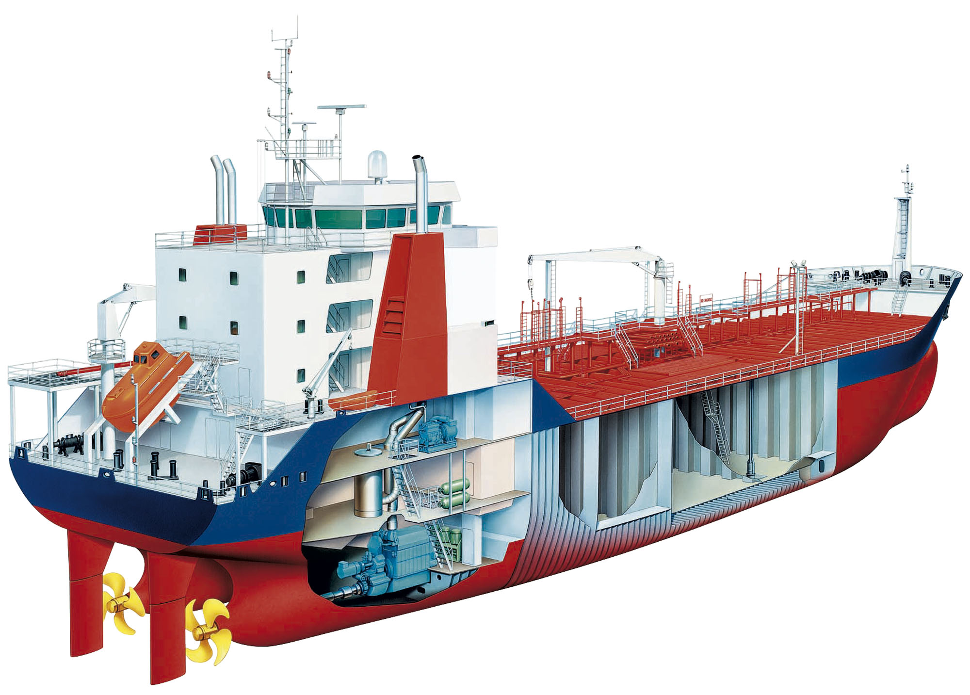 Querschnitt eines SCOT 8000-Tankers